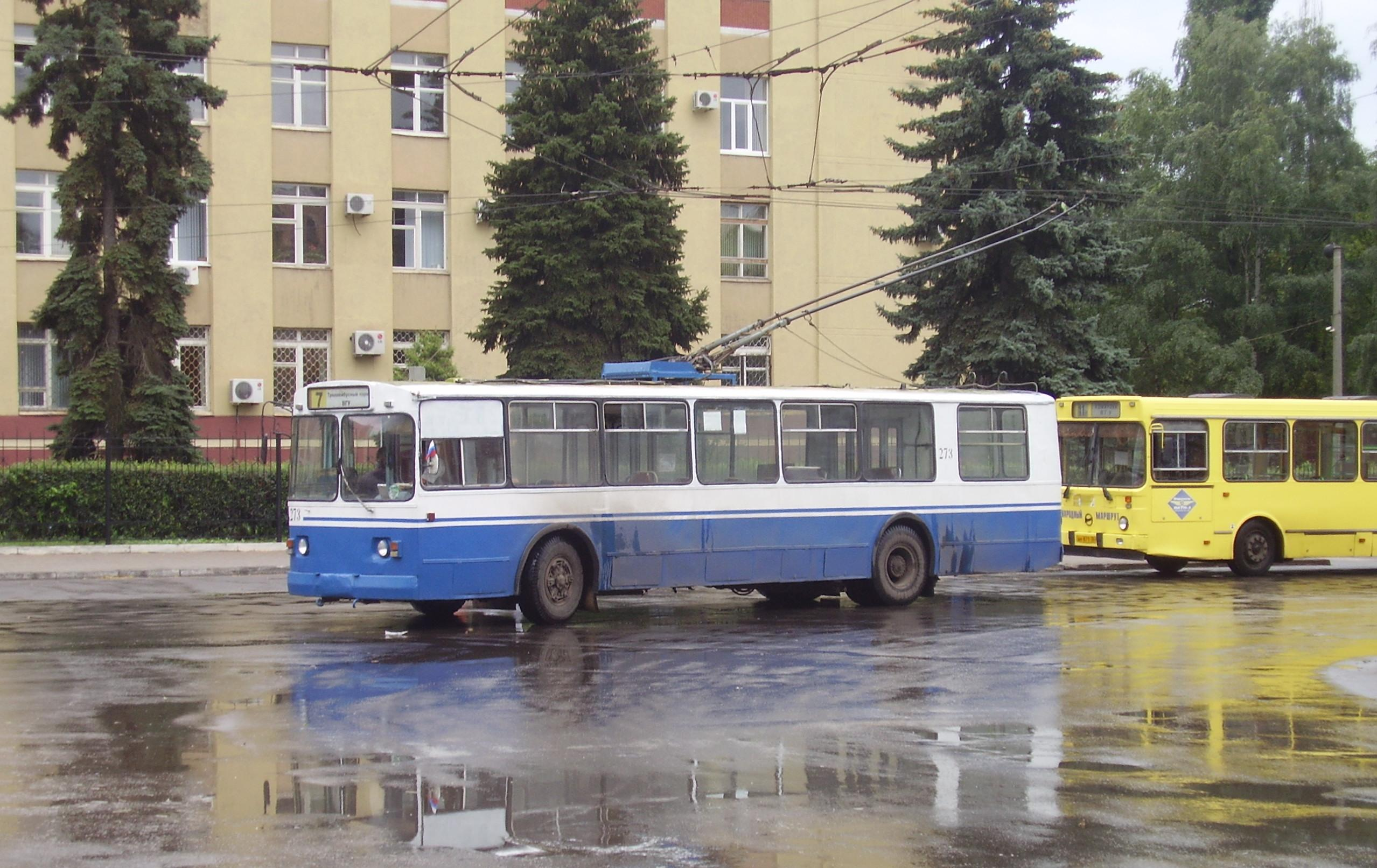 Троллейбус в Воронеже у ВГУ на Университетской площади